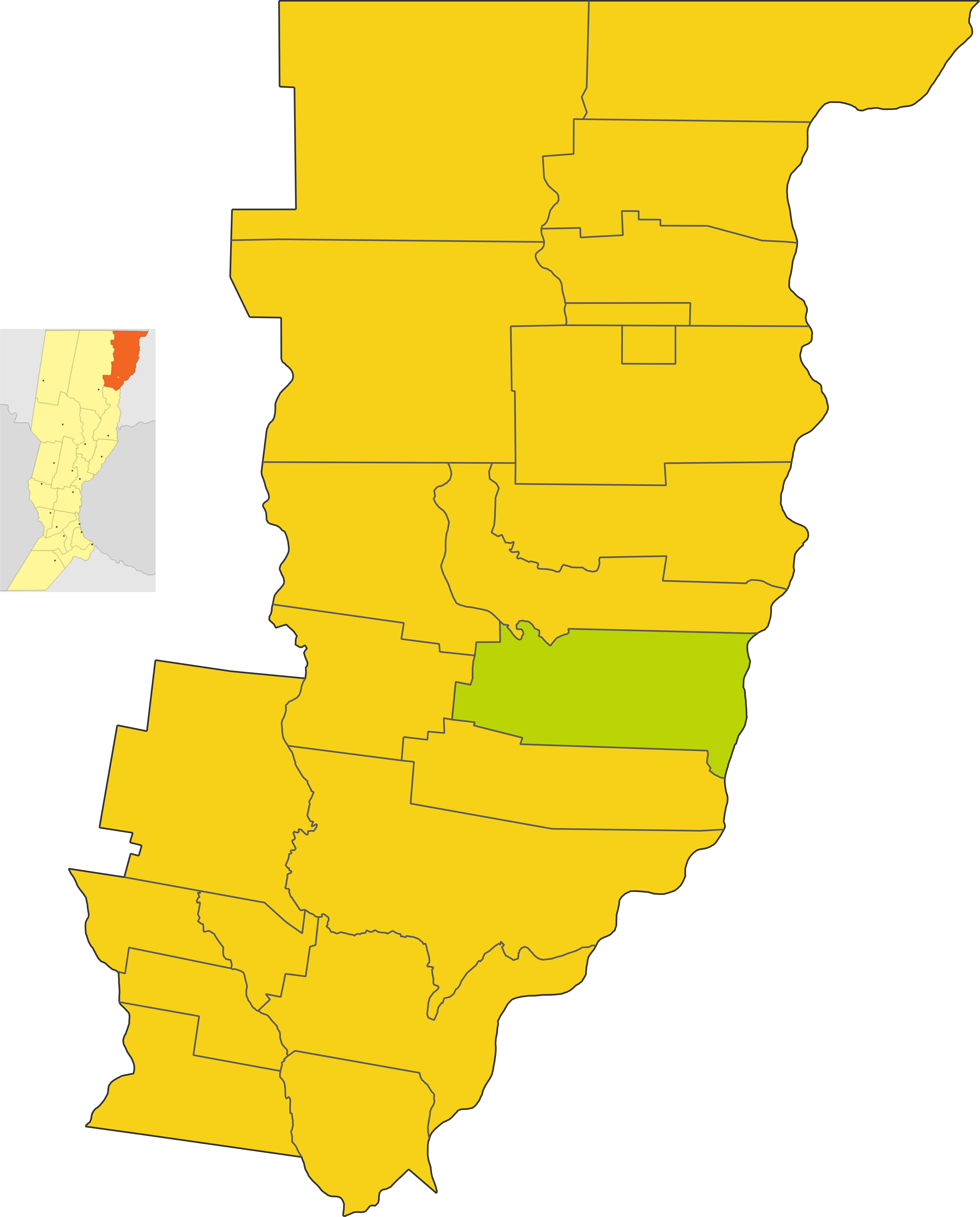 Map of the comuna de Las garzas in General obligado department, Santa Fe province, Argentina